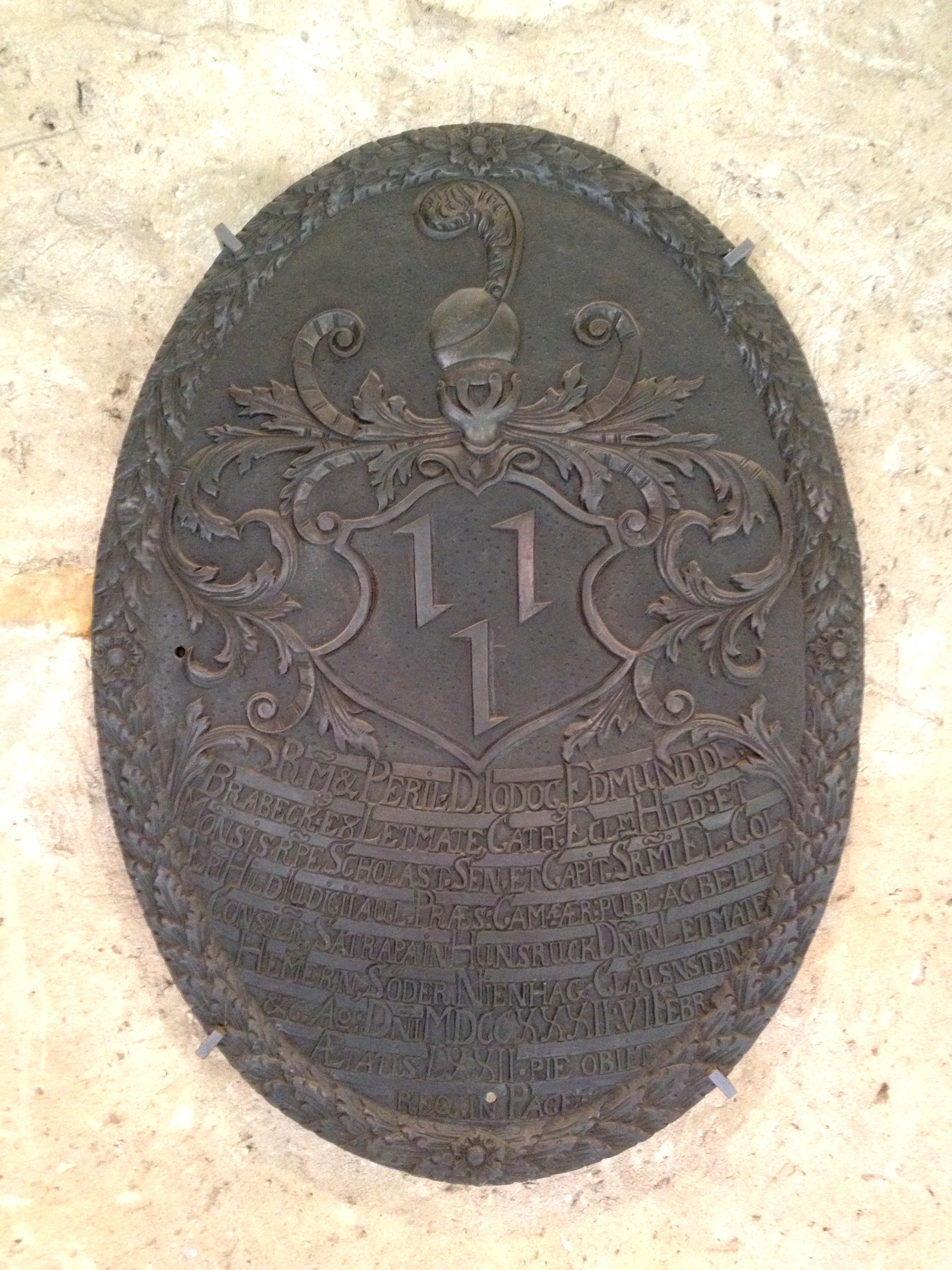 Hildesheim, Domkreuzgang, Epitaph Jobst Edmund von Brabeck (1660-1732)